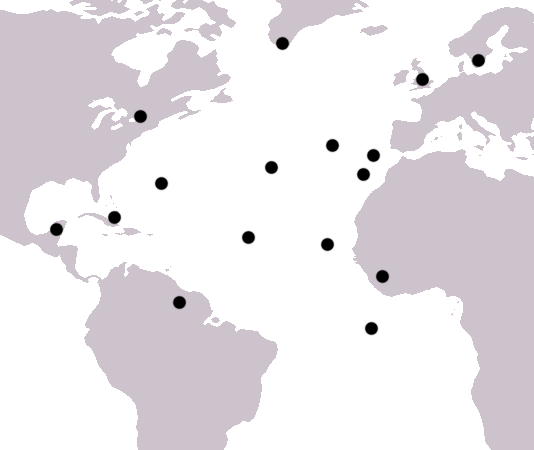 Места предполагаемого расположения Атлантиды